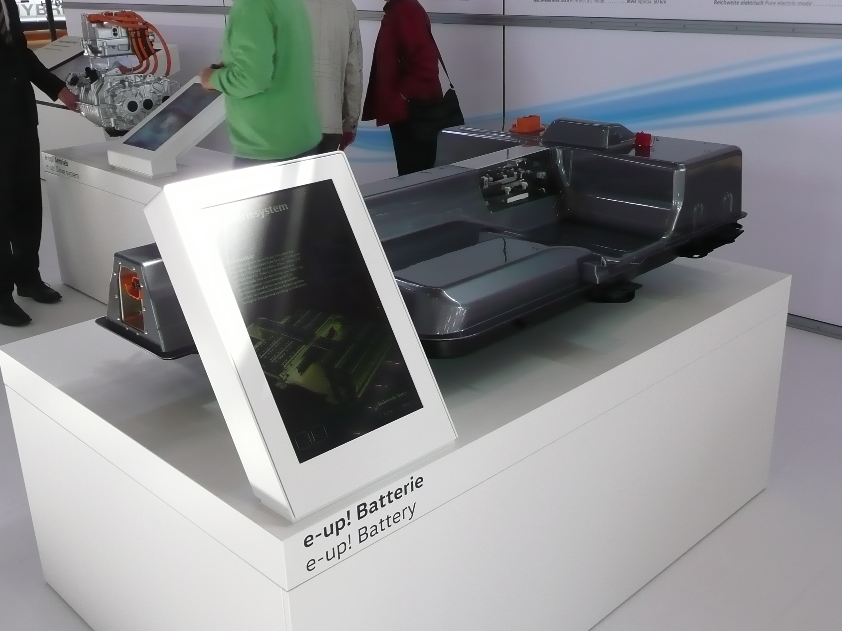 Lithium-Ionen-Batterie des Elektrogolf, ausgestellt in der Gläsernen Manufaktur